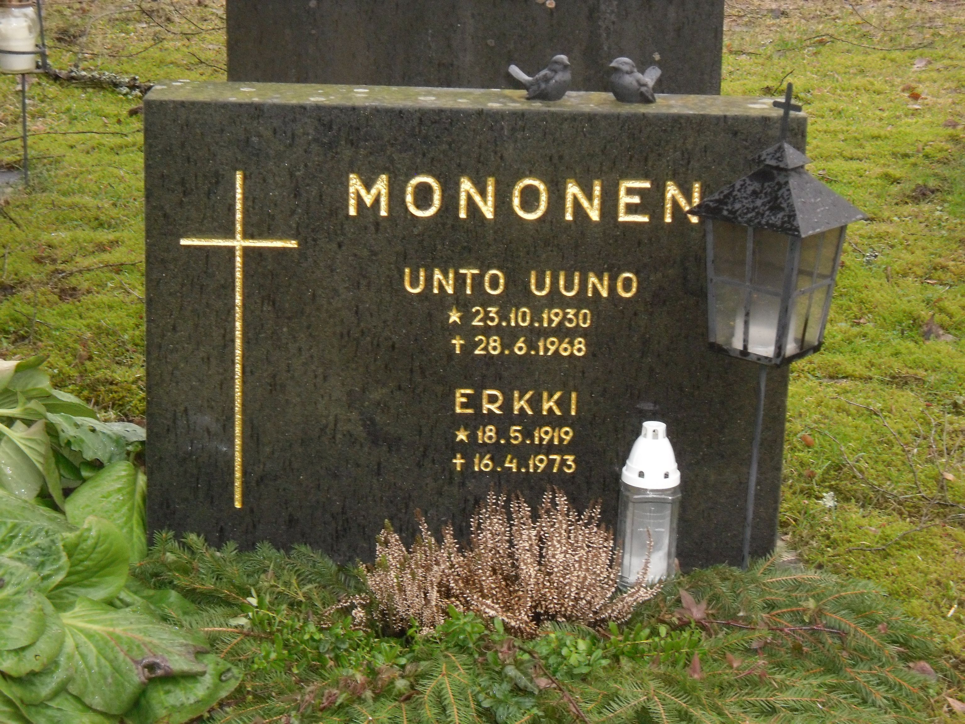 säveltäjä ja muusikko Unto Monosen hautakivi Someron hautausmaalla